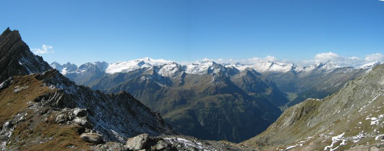 Blick über das Salzachtal bei Wald im Pinzgau in die Venedigergruppe und den Westteil des Europaschutzgebiets und Nationalparks Hohe Tauern. Blick aus der Filzenscharte der Kitzbüheler Alpen das Filzbachtal/Trattenbachtal auswärts (ganz links Gamskogel 2206 m), vorne der Bannwald über Vorderkrimml, mittig Achselkogel (2666 m) über Krimml, rechts Fürlegggrat gegen Großvenediger (Pyramide schräglinks), ganz links das Naturschutzgebiet Krimmler Hochtal gegen Glockenkarkopf (Europaspitze). Mitte Schlieferspitze, recht dahinter fern Dreiherrenspitze zu Südtirol, rechts die Reichenspitze über der Wildgerlos, ganz links Felber Tauern nebst Tauernkogel über dem Mittersiller Felbertal.